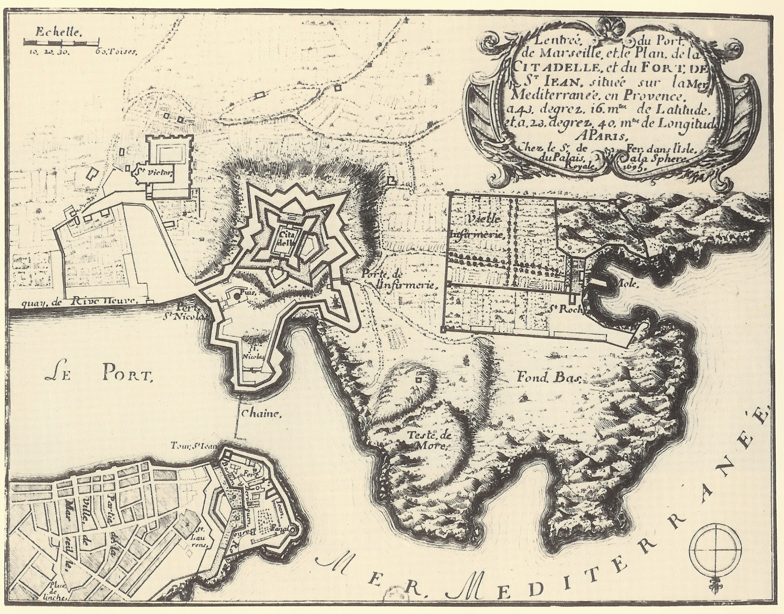 Entrée du Vieux-Port de Marseille en 1695. Gravure de Nicolas de Fer, Bibliothèque nationale, Cabinet des estampes.